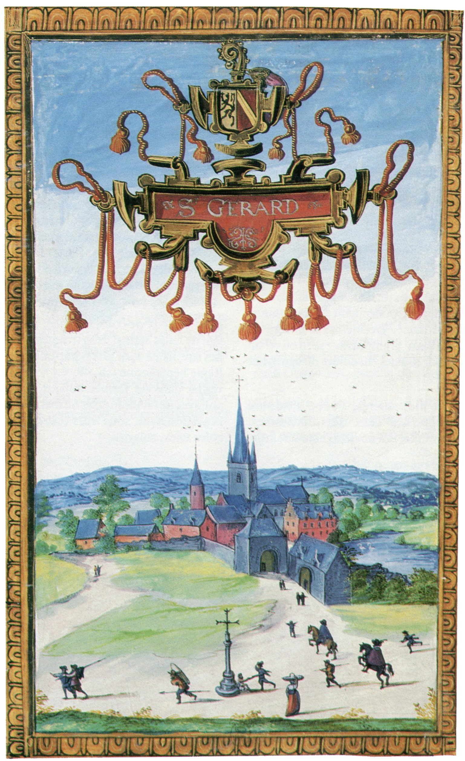 Abbaye Saint-Gérard de Brogne en 1604. Albums de Croÿ, Paris, Bibliothèque nationale.